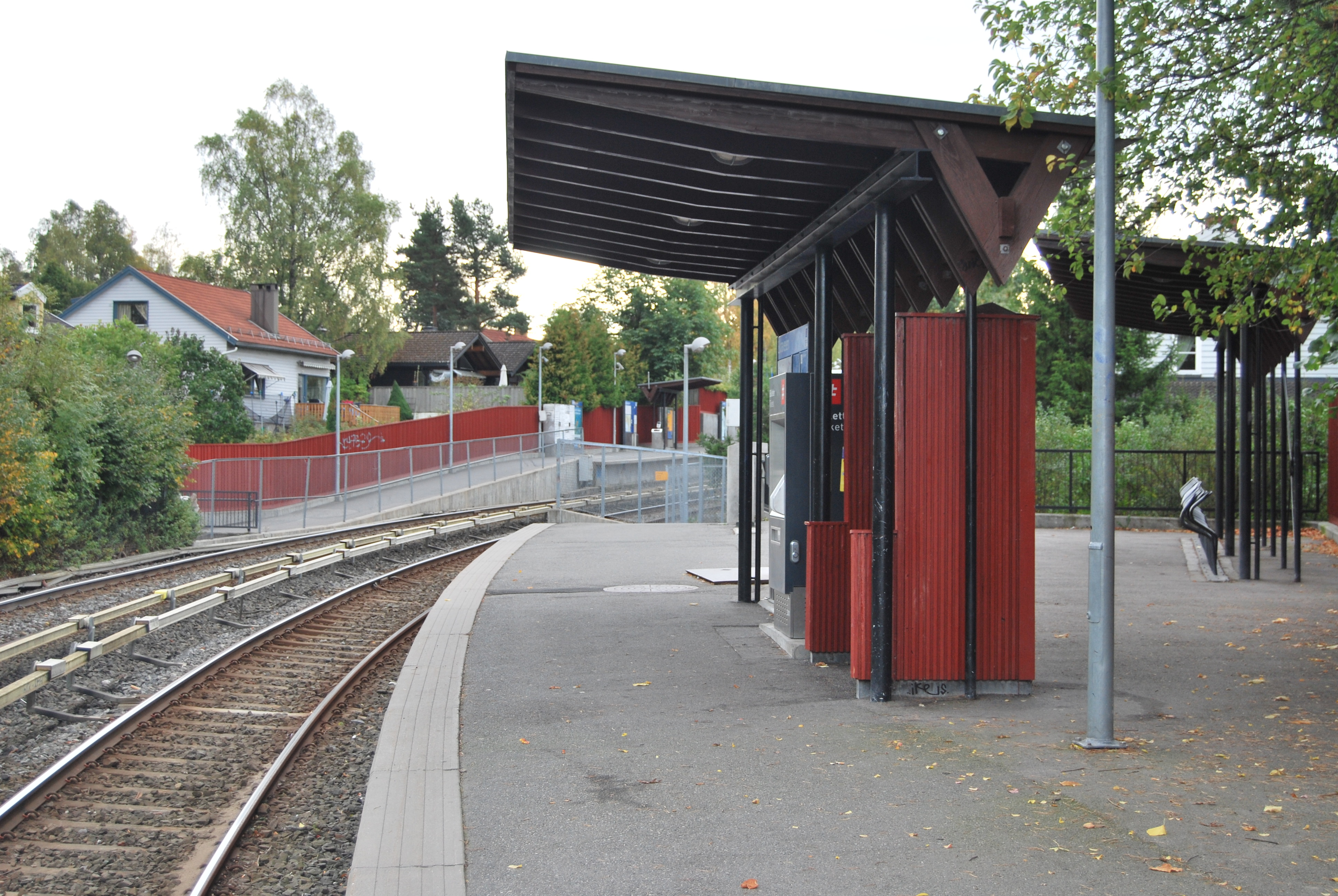 Ekraveien stasjon (Oslo) 2009 r.